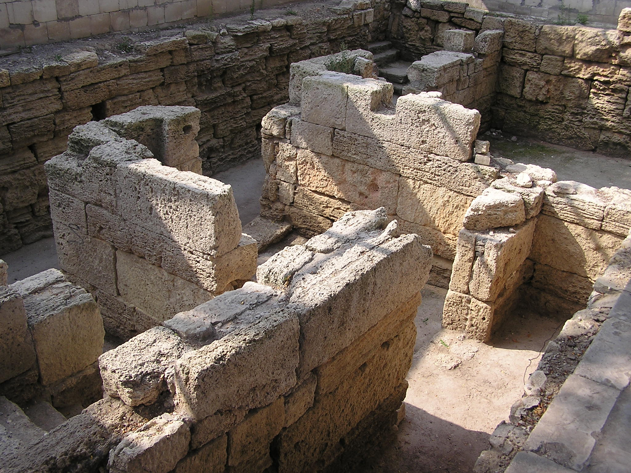 Херсонес. Монетный двор в Херсонесе